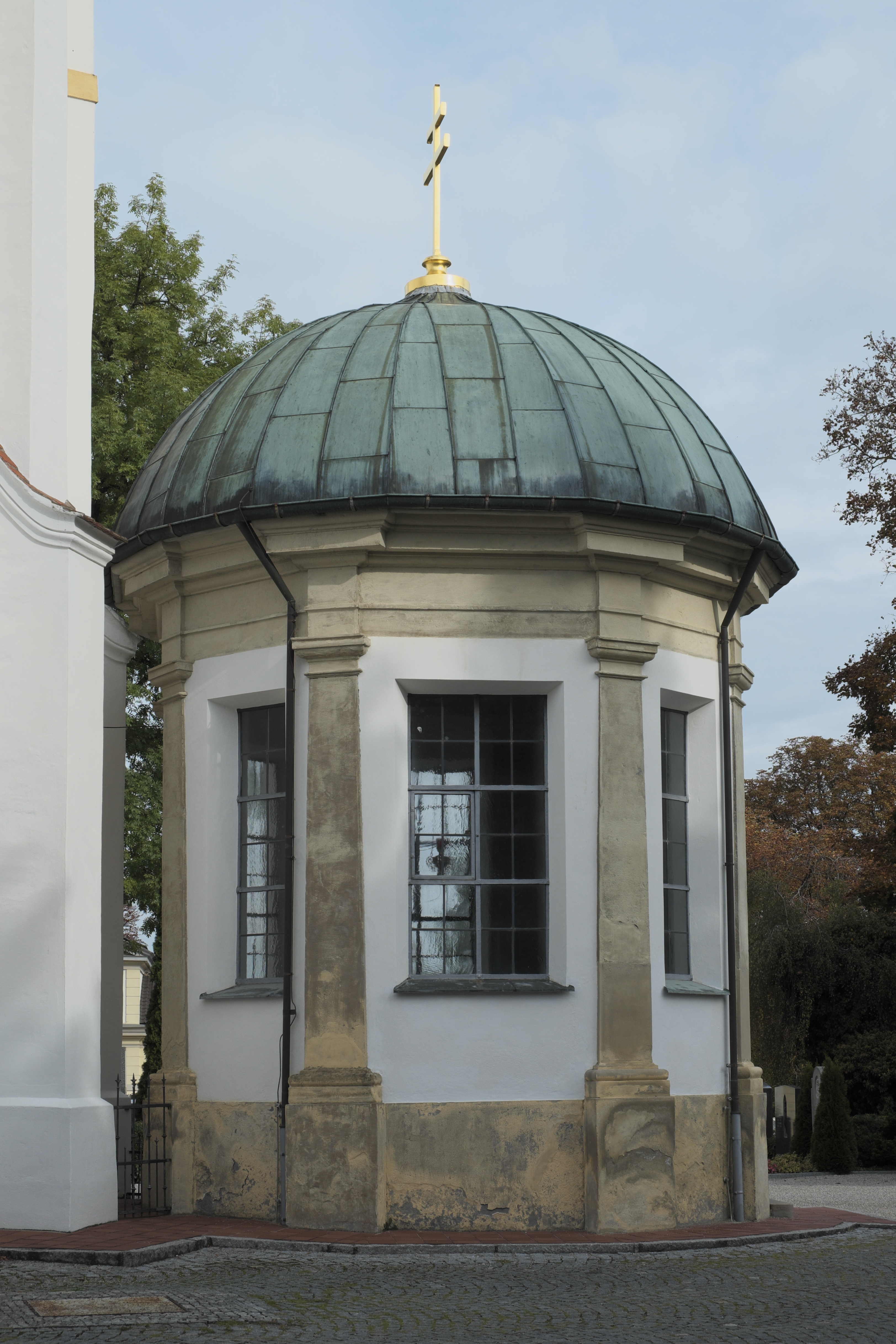 Katholische Pfarrkirche St. Martin in Marktoberdorf im Landkreis Ostallgäu (Bayern/Deutschland), Grabkapelle für den Augsburger Fürstbischof Clemens Wenzeslaus von Sachsen, 1823 erbaut